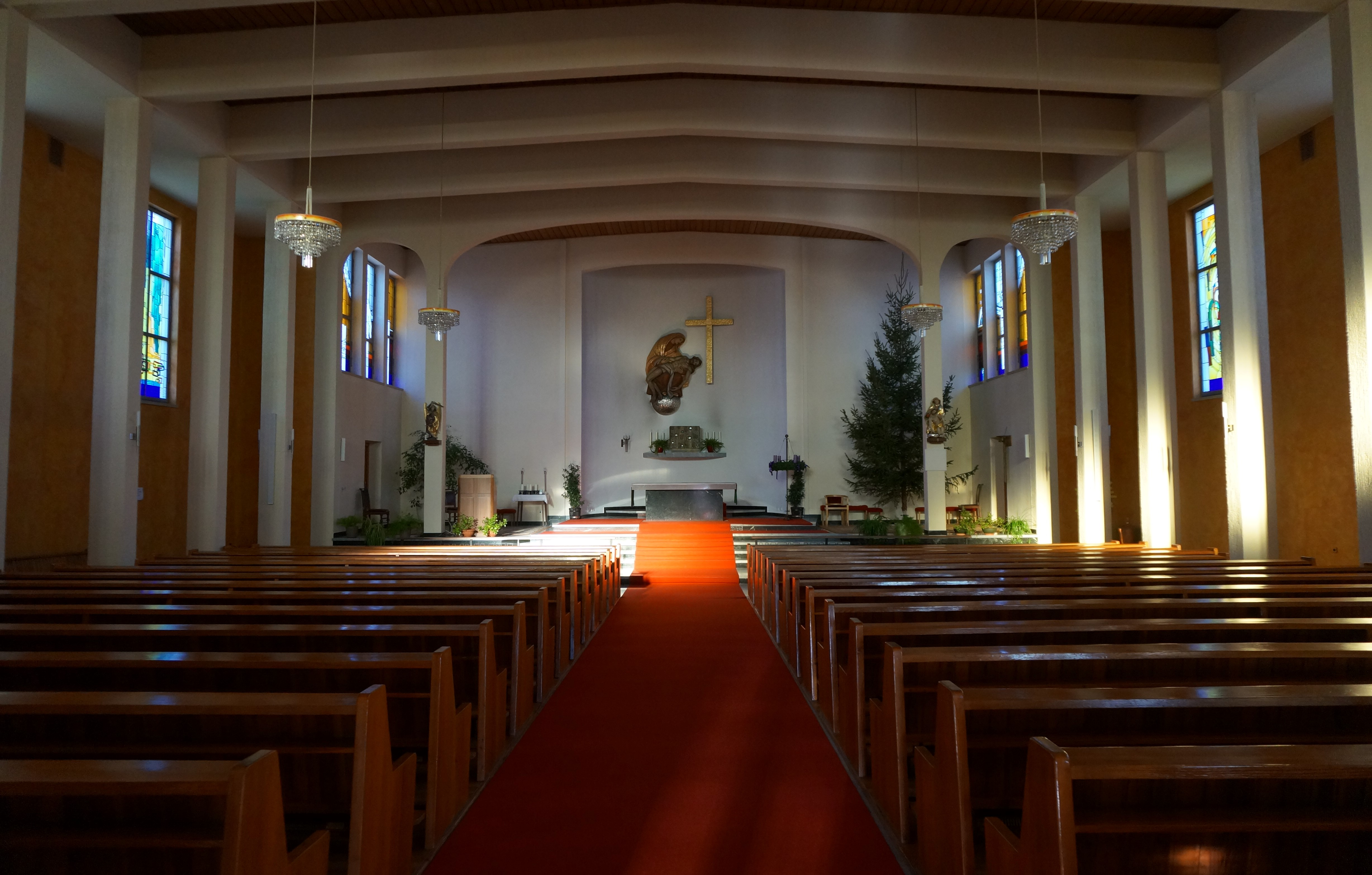 Kath. Pfarrkirche Herz-Mariae